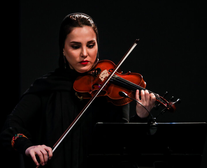 نیلوفر محبی در کنسرت شهر خاموش کیهان کلهر به همراه کوارتت «مینیاتور» ۲۶ فروردین ۱۳۹۸ تالار وحدت